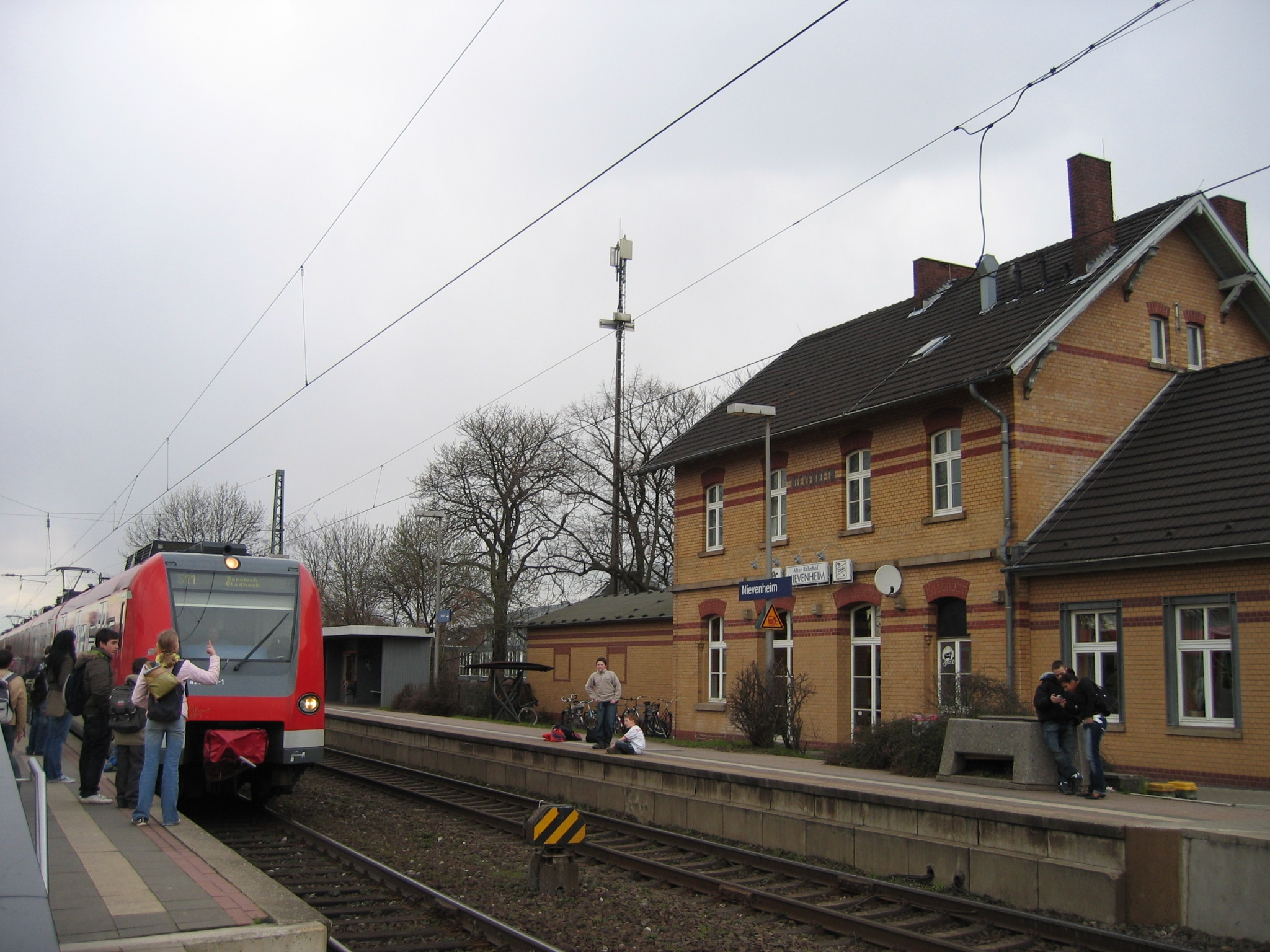 Dormagen Bahnhof Nievenheim (S-Bahn)